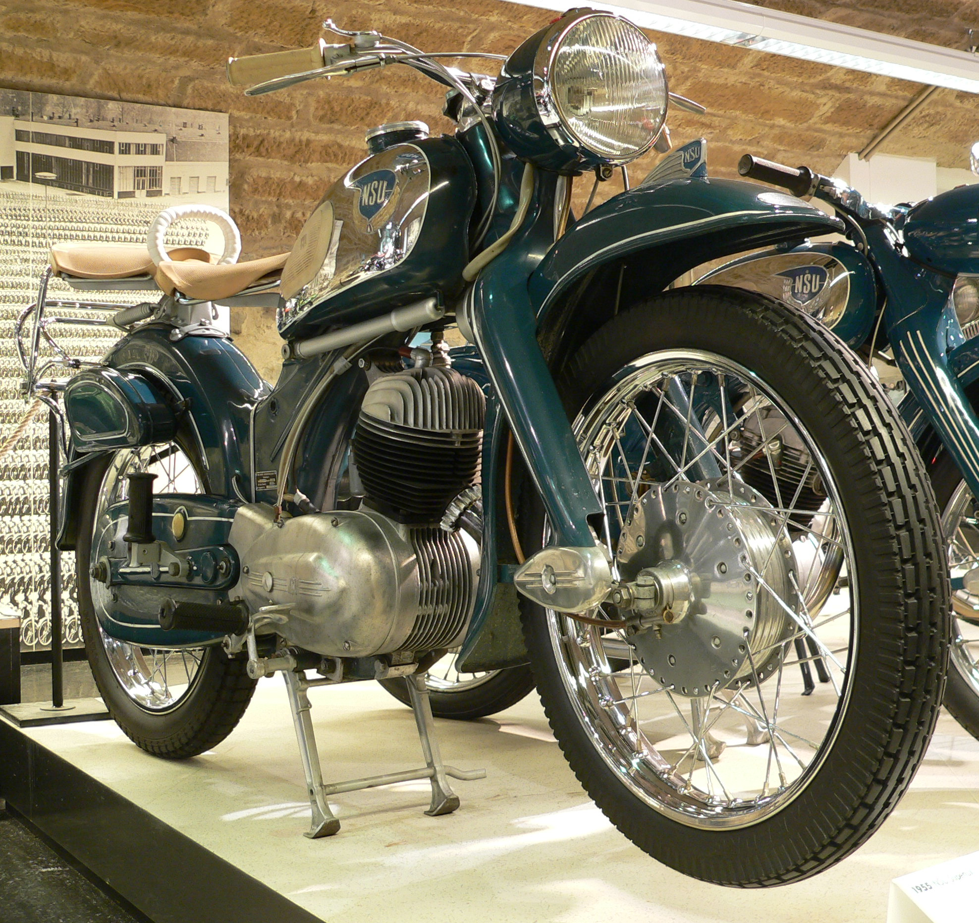 Motorbike "NSU Superlux" (1955) at the Deutsches Zweirad- und NSU-Museum